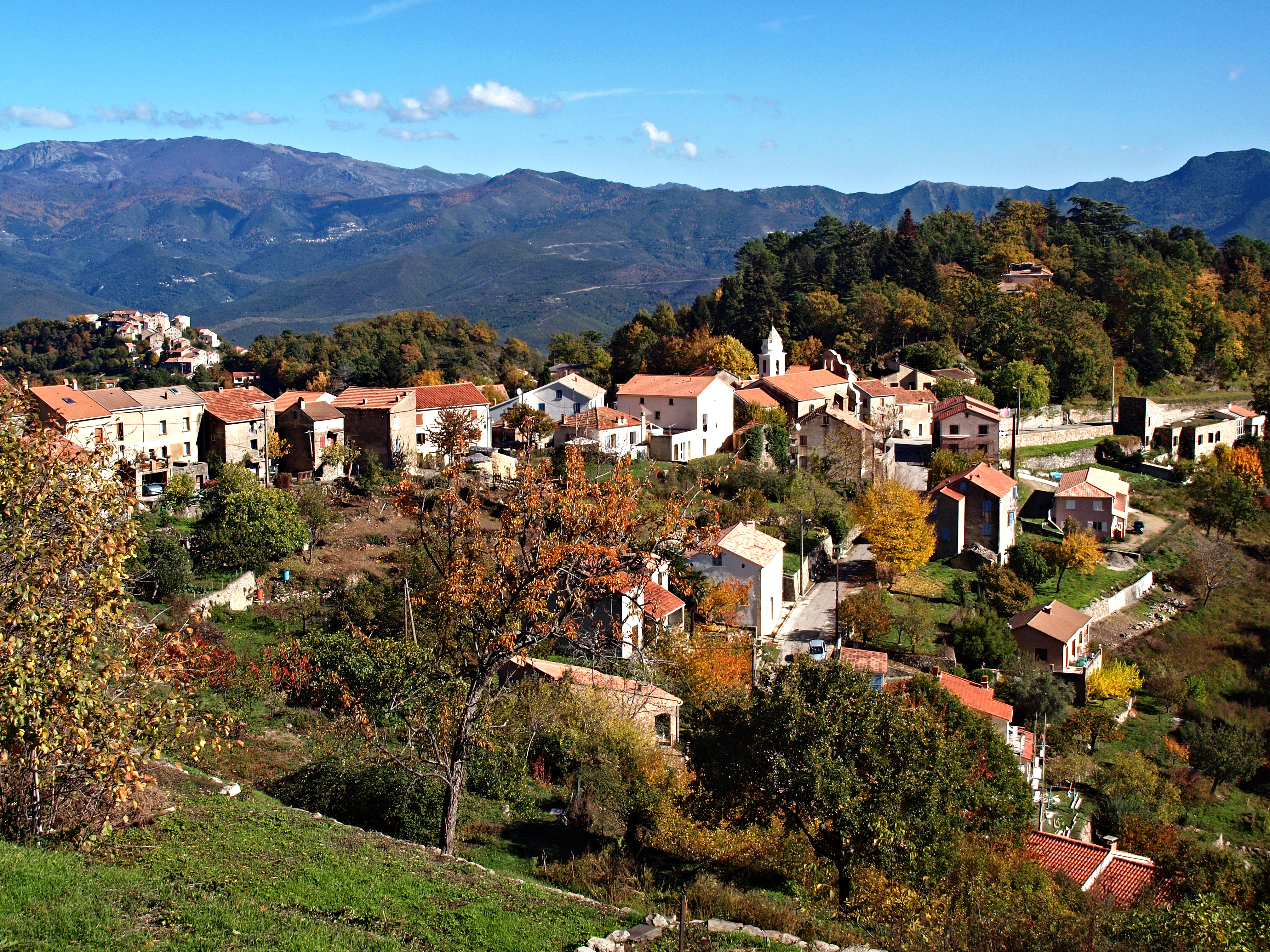 Santo-Pietro-di-Venaco (Corsica) - Vue du village